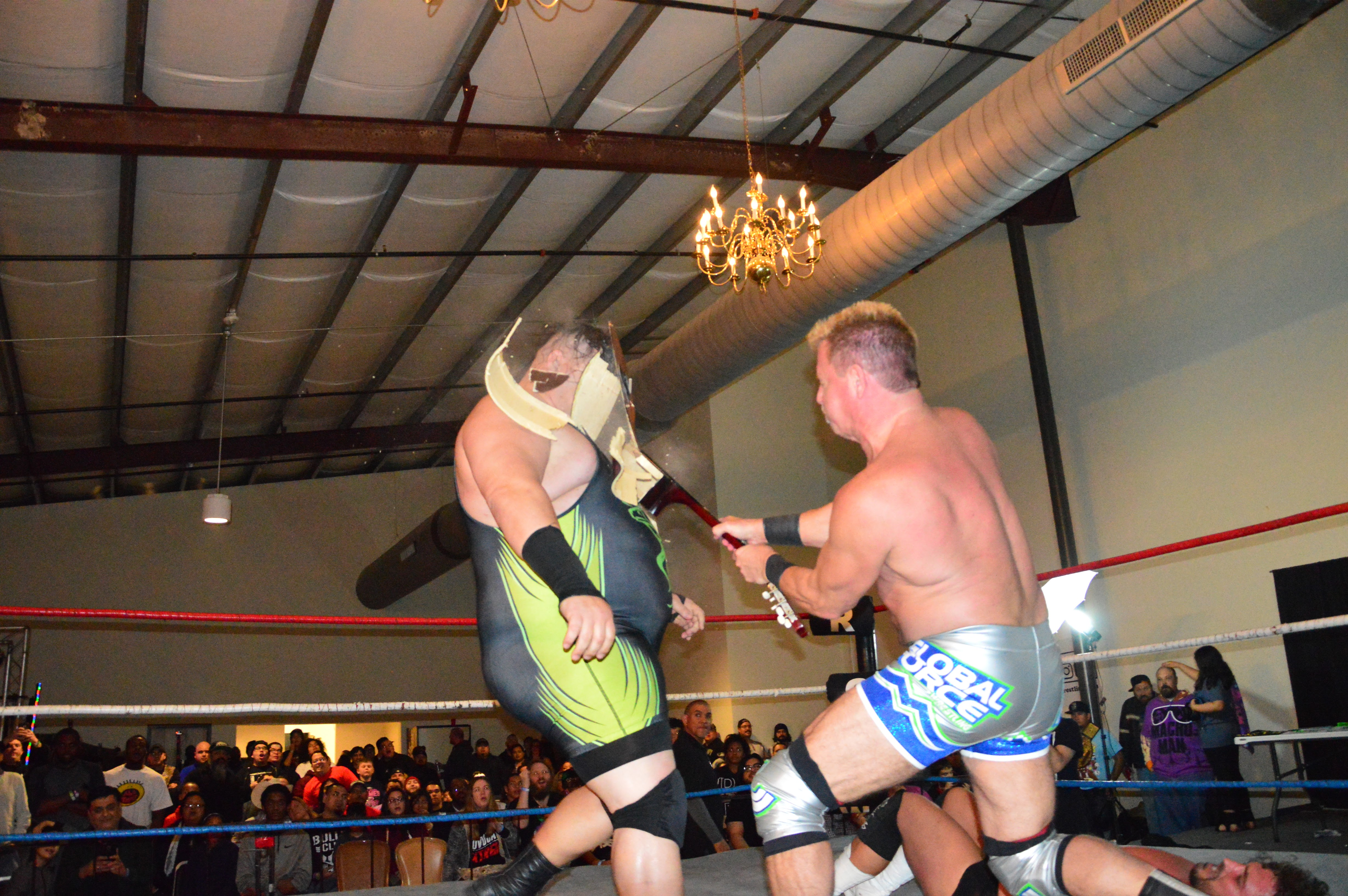 Le catcheur Jeff Jarrett casse une guitare sur le visage d'un autre catcheur.